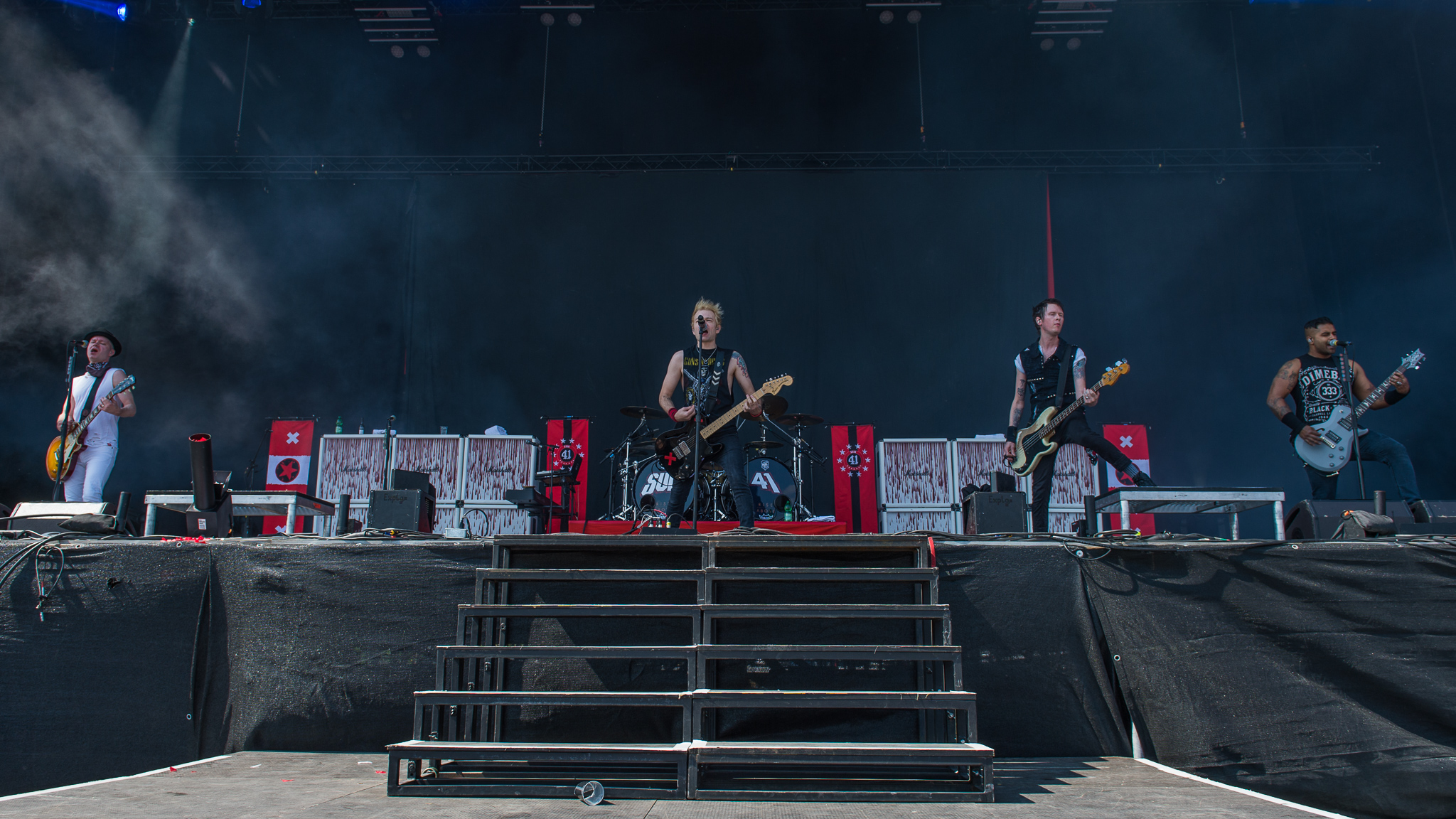 ARGO-Konzerte,Dave Baksh,Deryck Whibley,Jason McCaslin,Konzert,Livekonzert,Livemusik,Musik,RiP,Rock im Park 2017,Sum 41,Tom Thacker,Zeppelin Stage